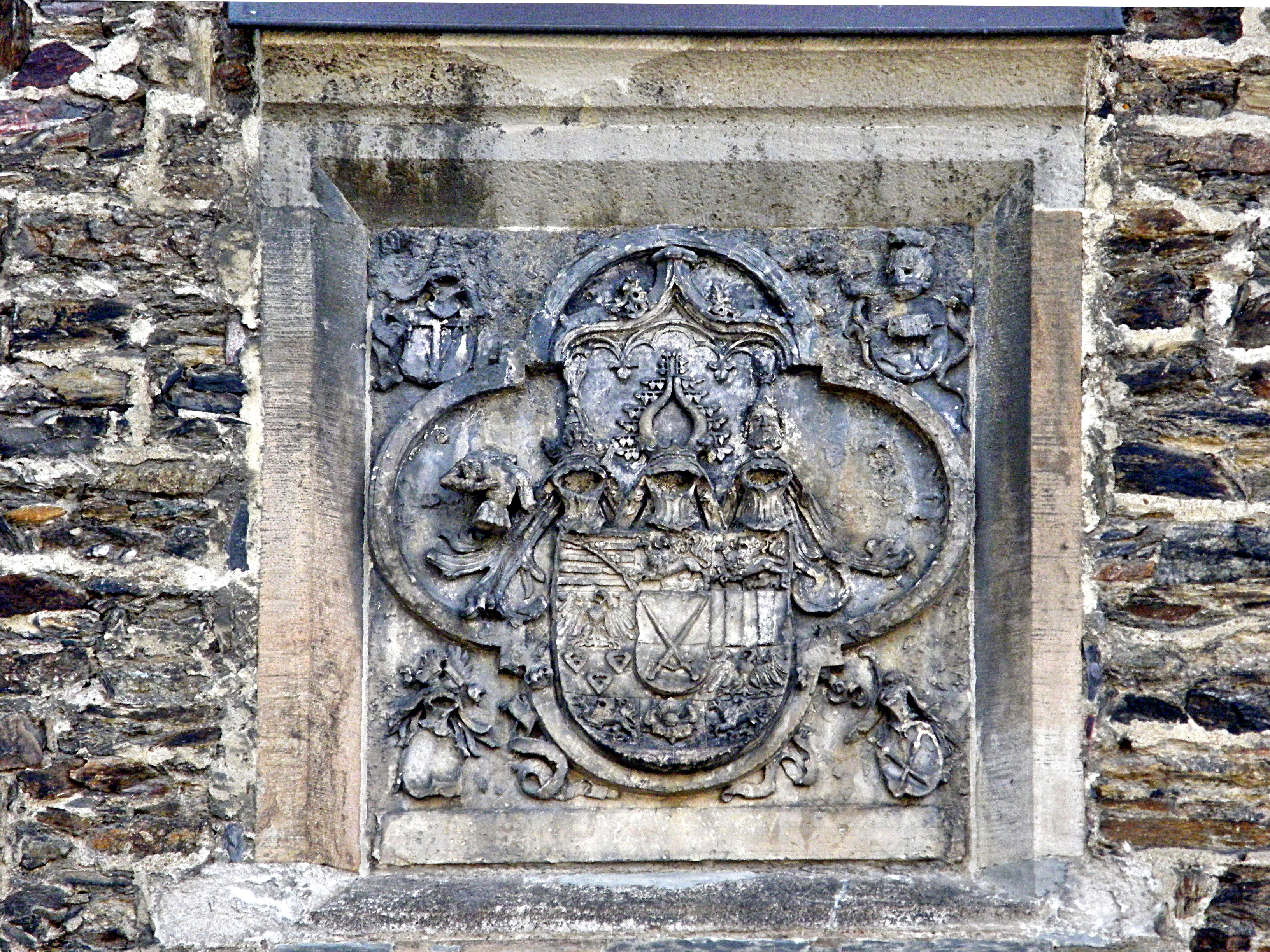 St. Wolfgangs-Kirche, Schneeberg: Wappenrelief über dem Haupteingang